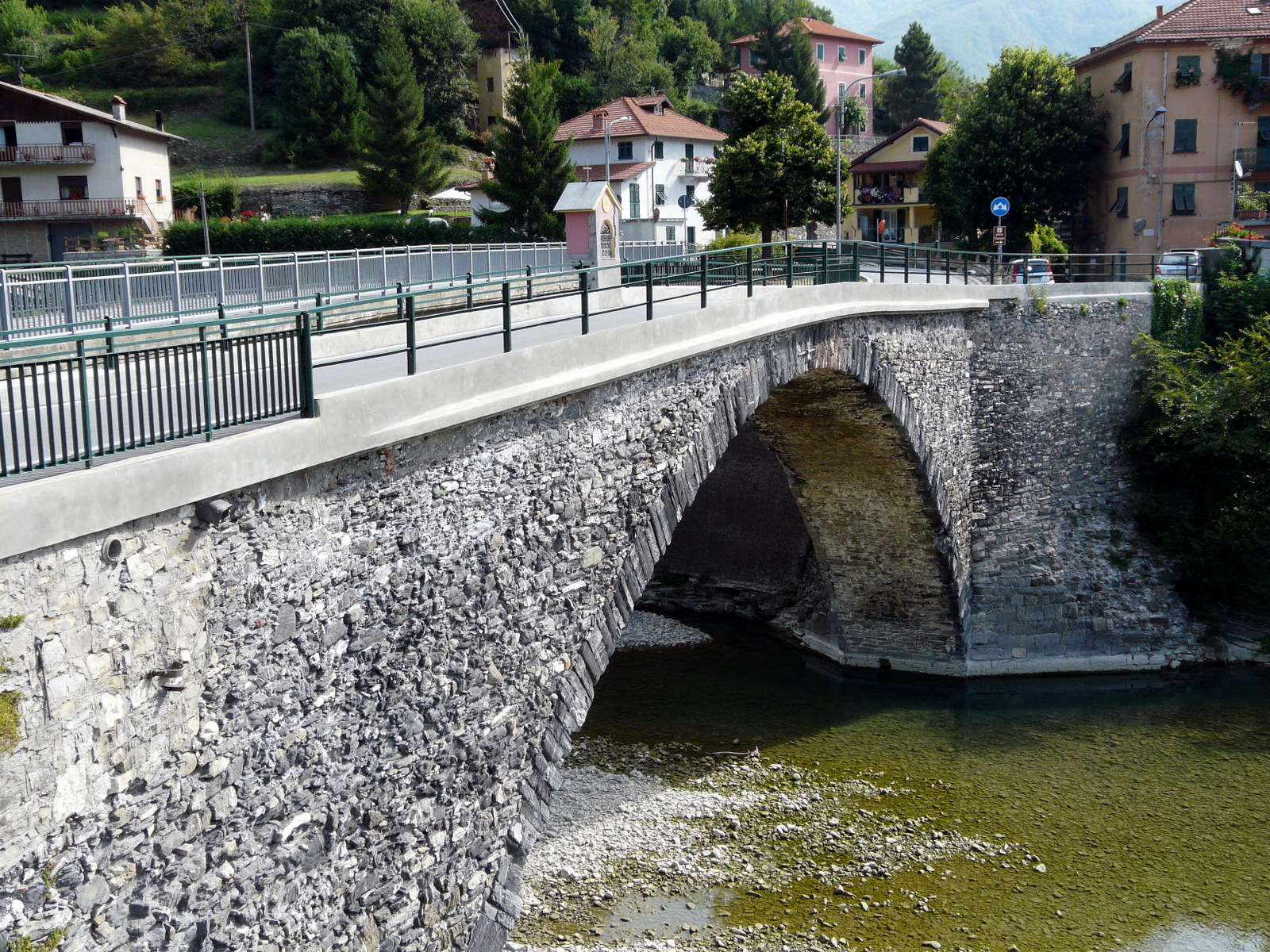 Il ponte sul torrente Scrivia a Savignone, Liguria, Italia